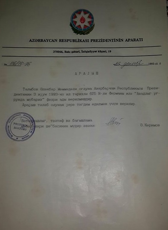 Azərbaycan Respublikası Prezidentinin 3 iyun 1993-cü il tarixli 625 №-li fərmanı ilə "Azadlıq uğrunda mübariz" fəxri adı verilmişdir.